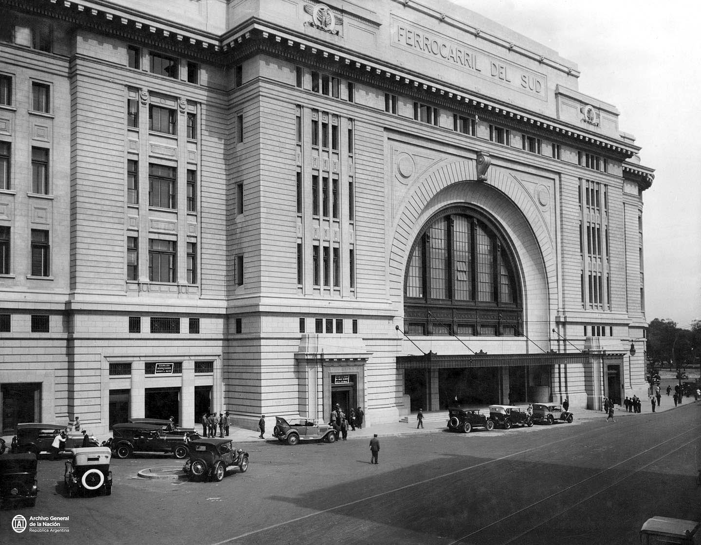 Fachada sobre la calle General Hornos del inconcluso edificio de la Estación Constitución del Ferrocarril del Sud (hoy General Roca), interrumpido por la Crisis de 1930 y luego por la Segunda Guerra Mundial. Buenos Aires, Argentina.